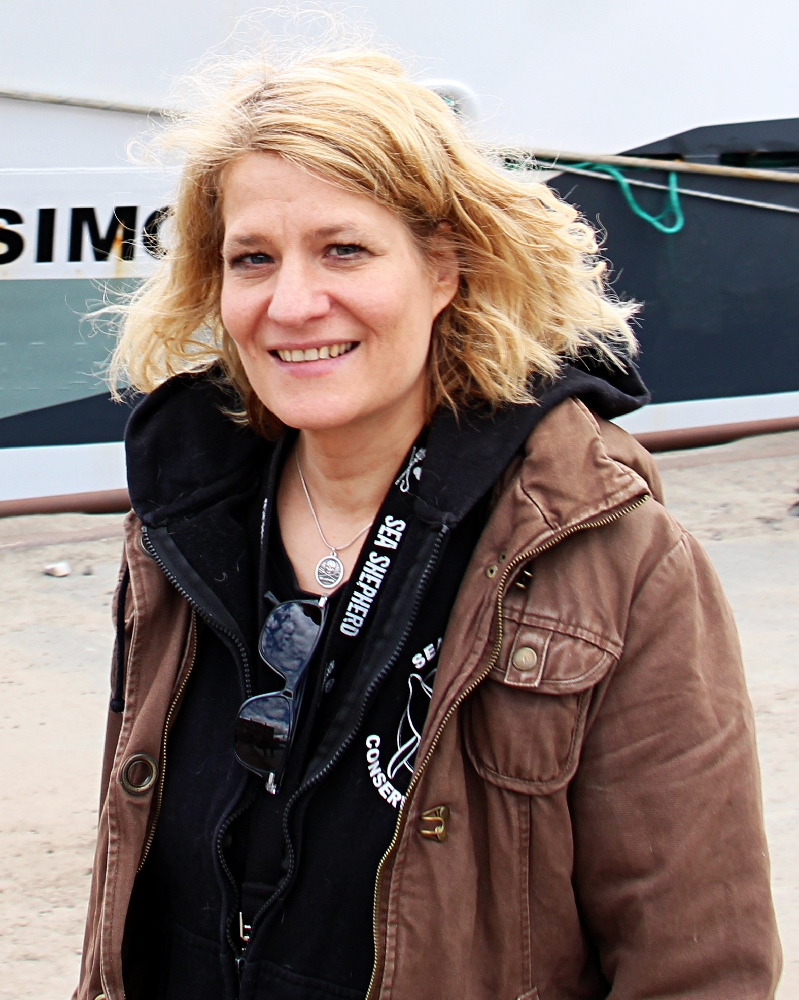 Bettina Jung, Mai 2015, Bremen